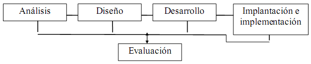 Esquema del diseño instruccional